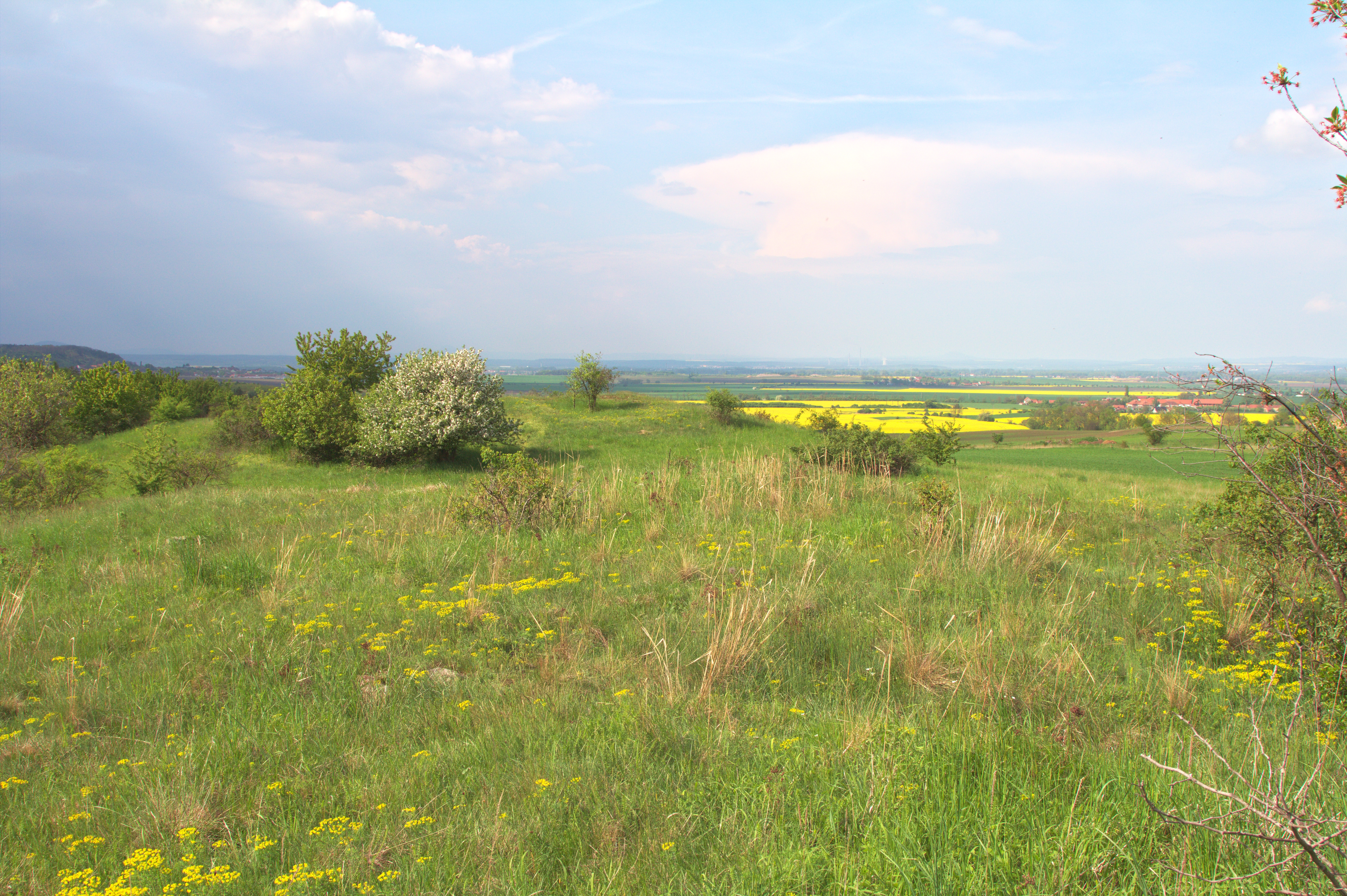 Vršky pod Špičákem (přírodní rezervace)